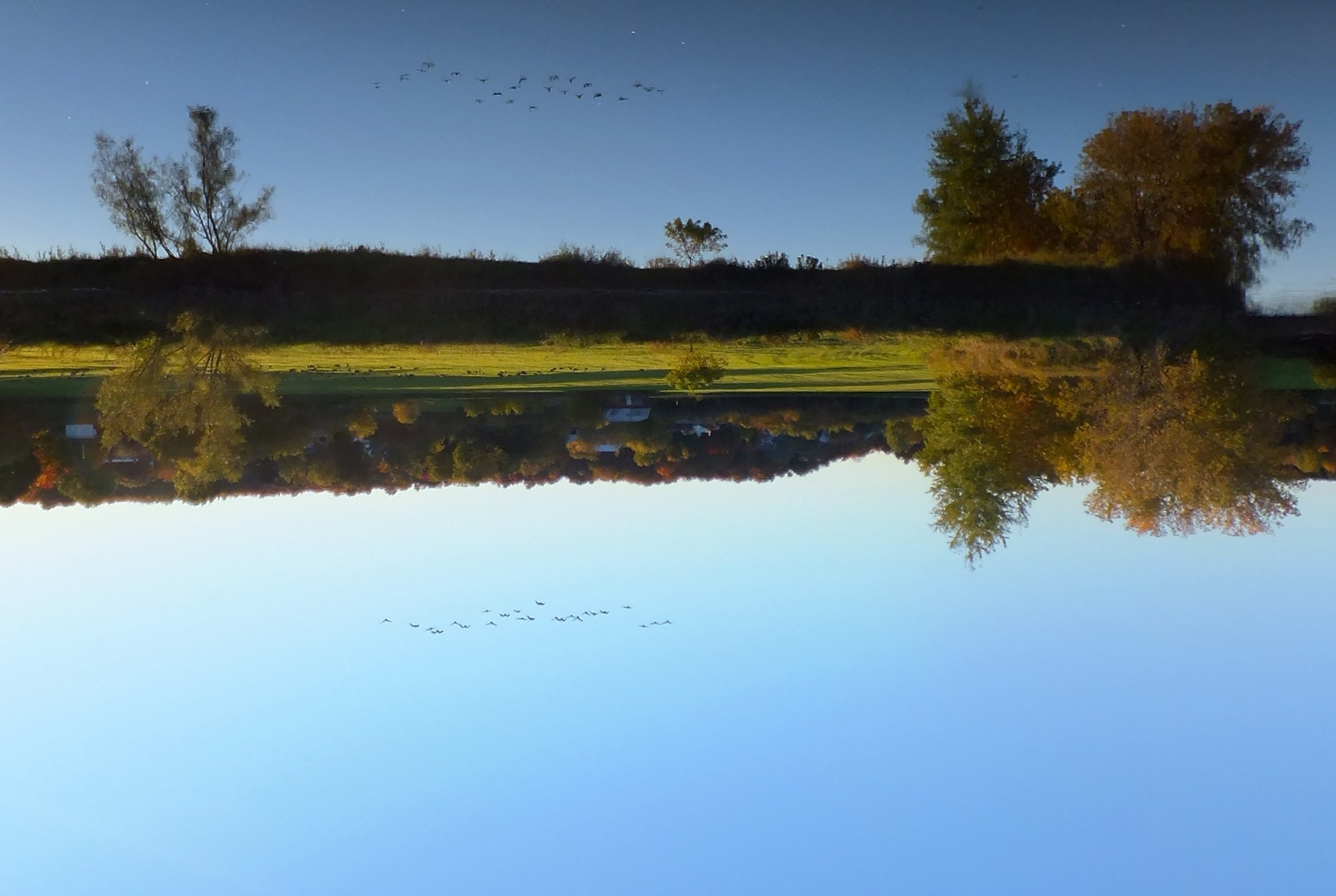 Bernaches du Canada (Branta canadensis) sur la plaine alluviale en face du village de Roxton Falls à la fin septembre 2013